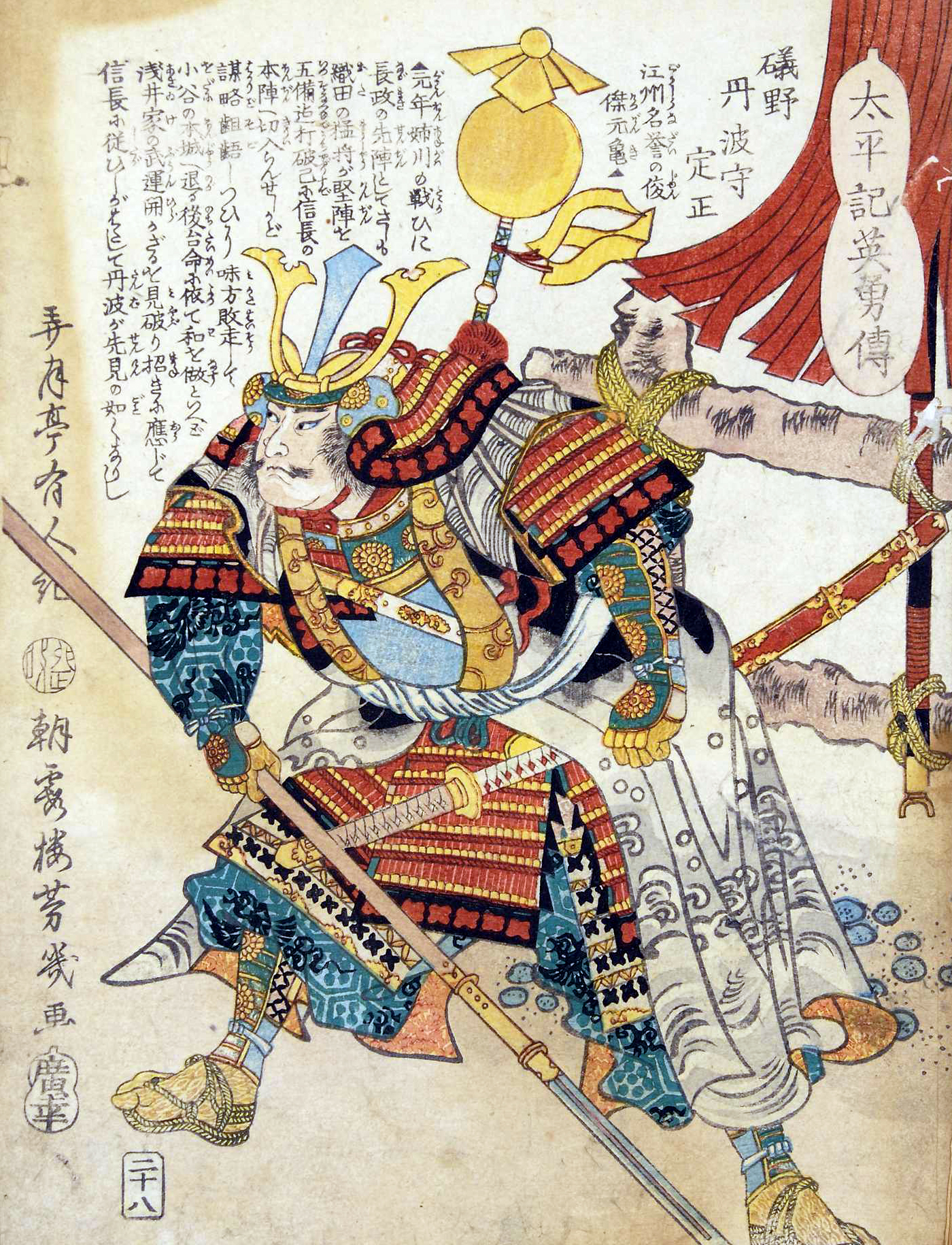 「太平記英勇伝二十八：磯野丹波守定正（＝磯野員昌）」